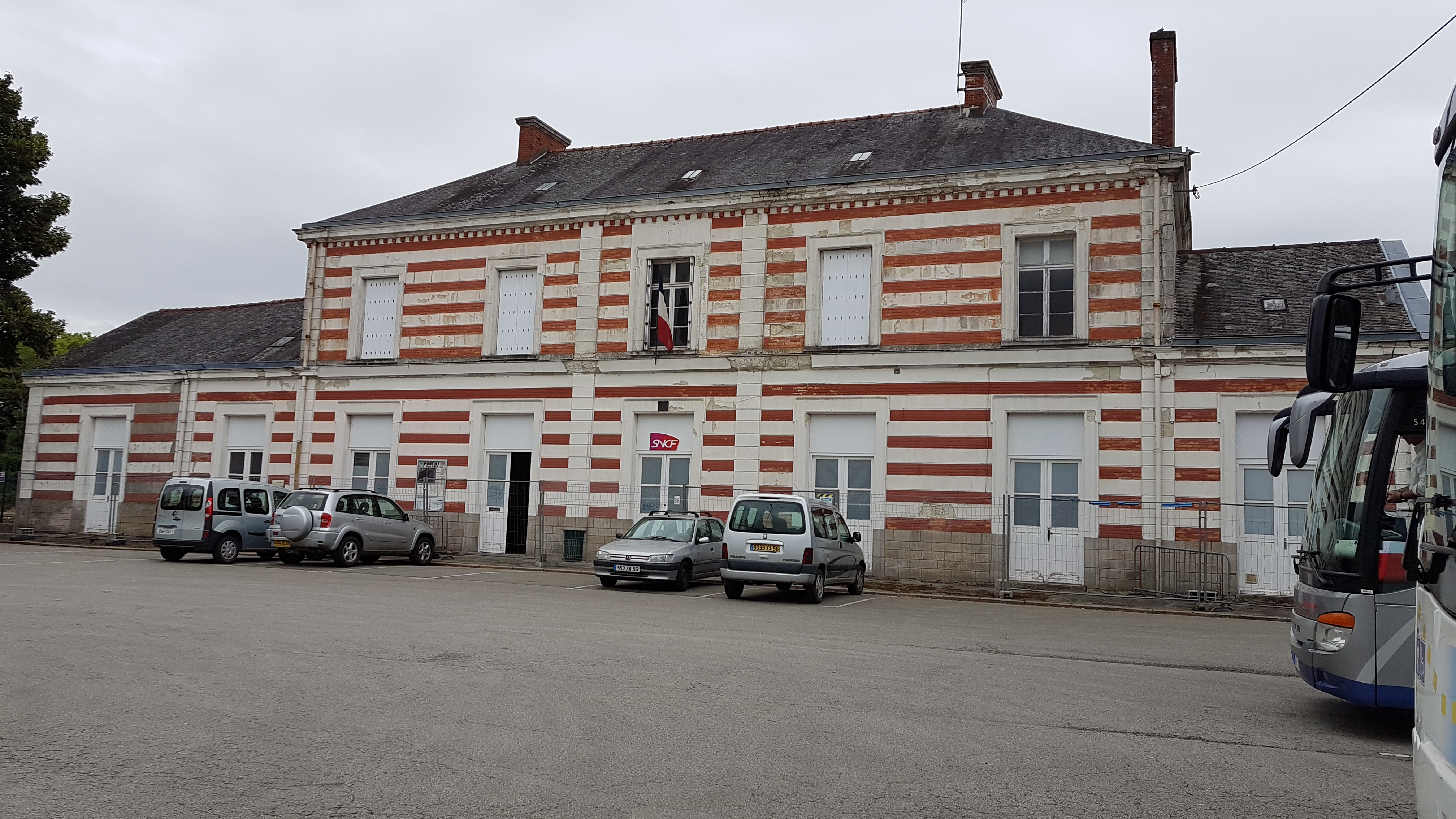 Gare de Pontivy - Place Brard